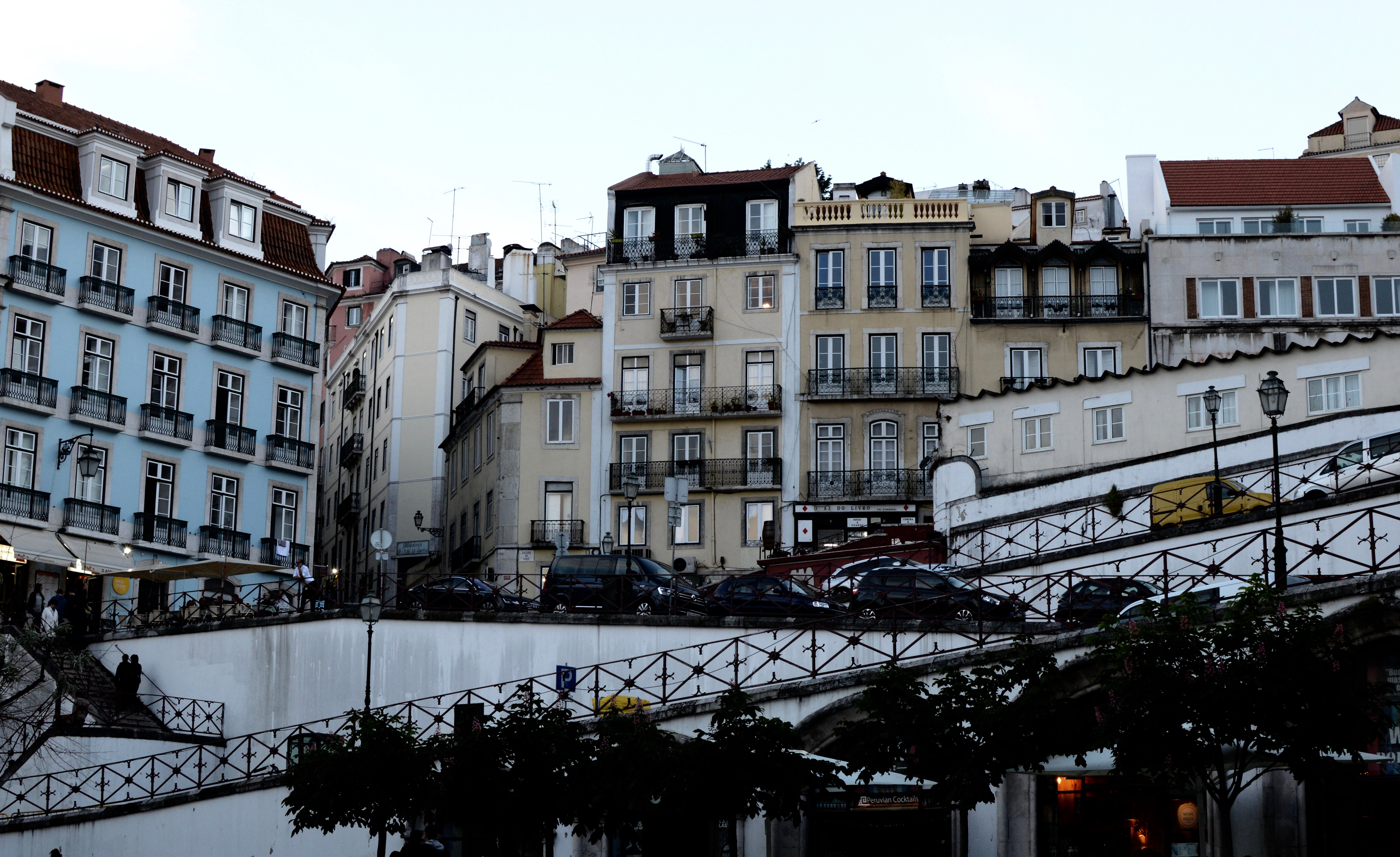 Bairro Alto, Lisbon